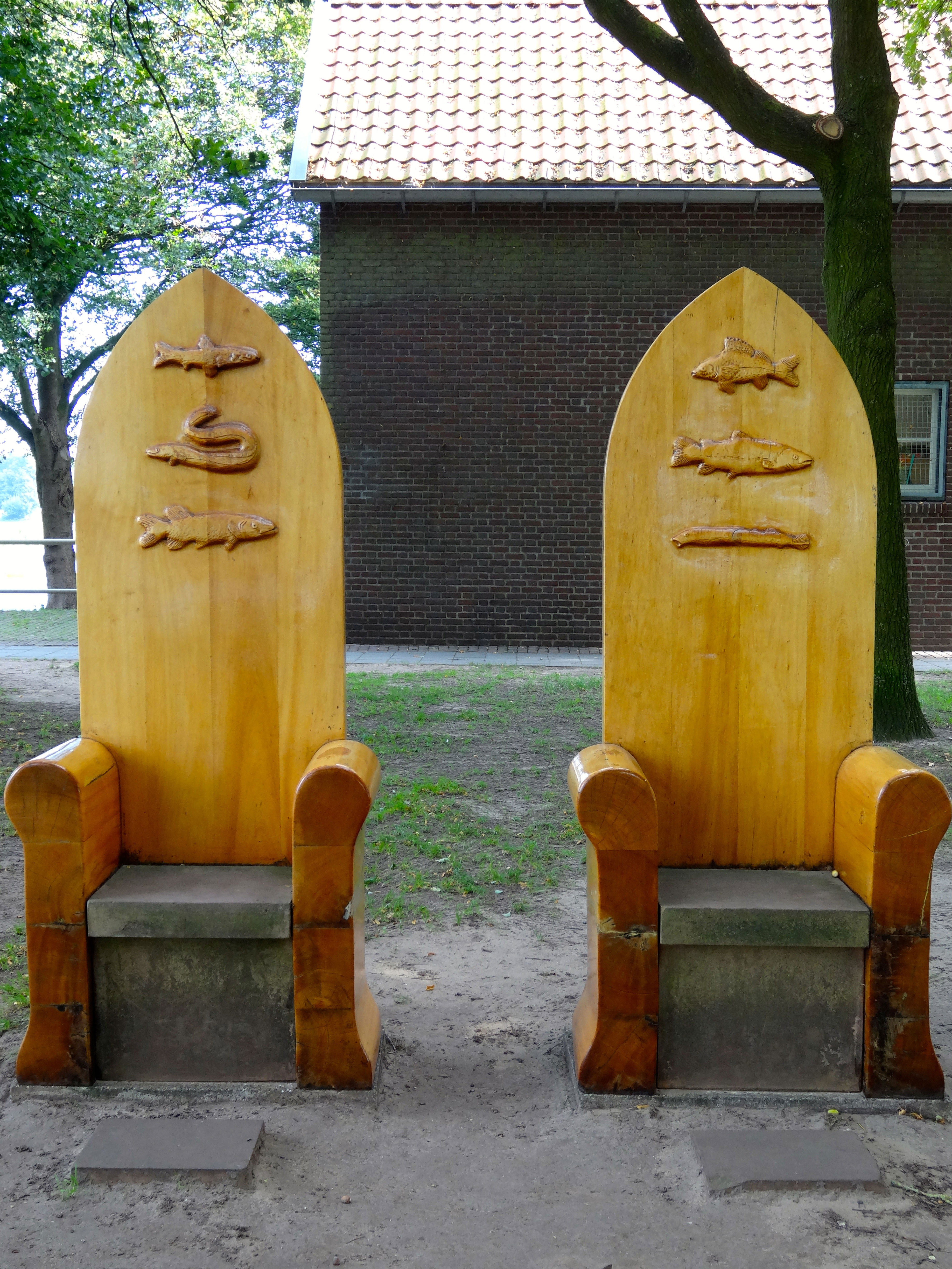 "Twee tronen", waterschapsbanken door Jacomijn Schellevis bij de stuw nabij Vilsteren in de Overijsselse Vecht